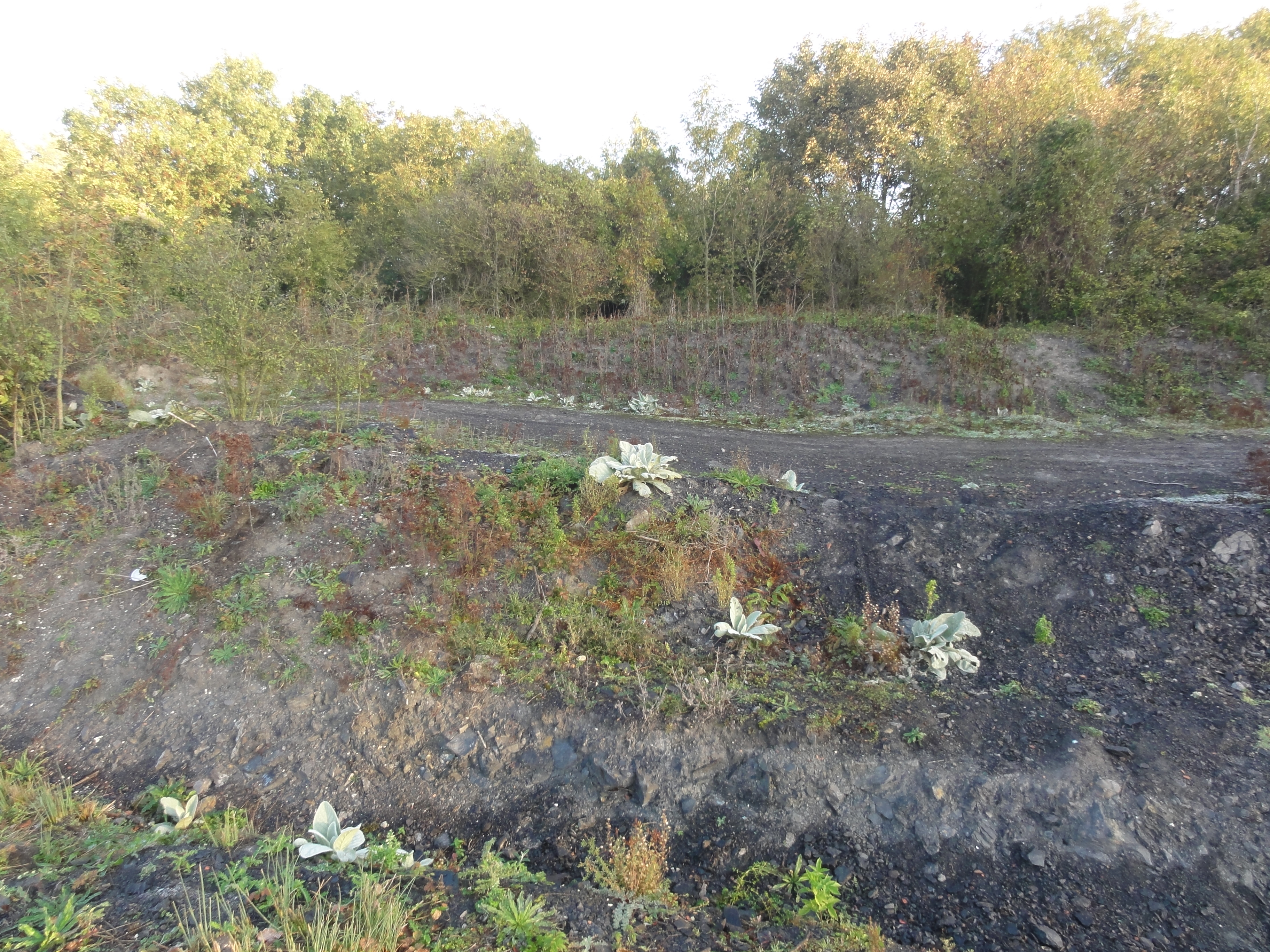 Terril n° 210A dit 16 - 18 d'Oignies, fosse n° 8 - 16 de la Compagnie des mines de Courrières dans le bassin minier du Nord-Pas-de-Calais, Courrières, Pas-de-Calais, Nord-Pas-de-Calais, France.